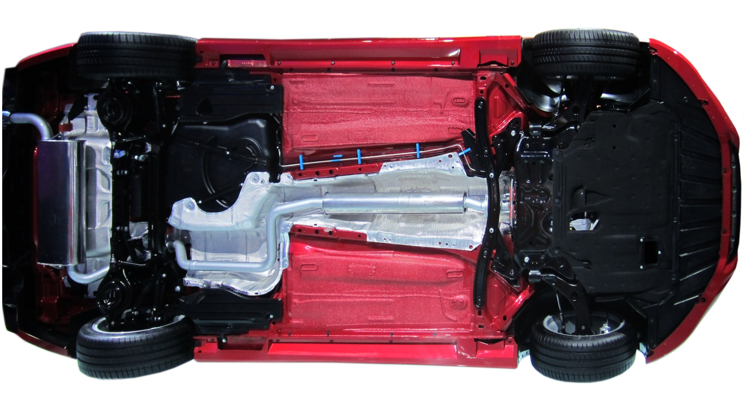 Bodengruppe eines Ford Focus 2011 (echt, kein Modell) von unten